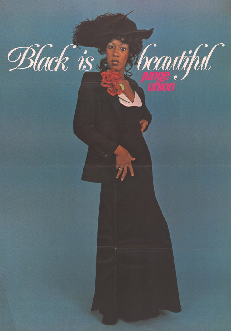 Black is beautiful junge unionAbbildung:Junge farbige LadyKommentar:Vgl. Plakat Nr. 10-028-26Plakatart:Motiv-/TextplakatKünstler_Grafiker:Graphic Design Broder Brodersen, HannoverAuftraggeber:Junge Union NiedersachsenDrucker_Druckart_Druckort:Georg Westermann, Braunschweig Objekt-Signatur:10-008 : 359Bestand:Landtagswahlplakate Niedersachsen (10-008)GliederungBestand10-18:Landtagswahlplakate Niedersachsen (10-008) » CDULizenz:KAS/ACDP 10-008 : 359 CC-BY-SA 3.0 DE